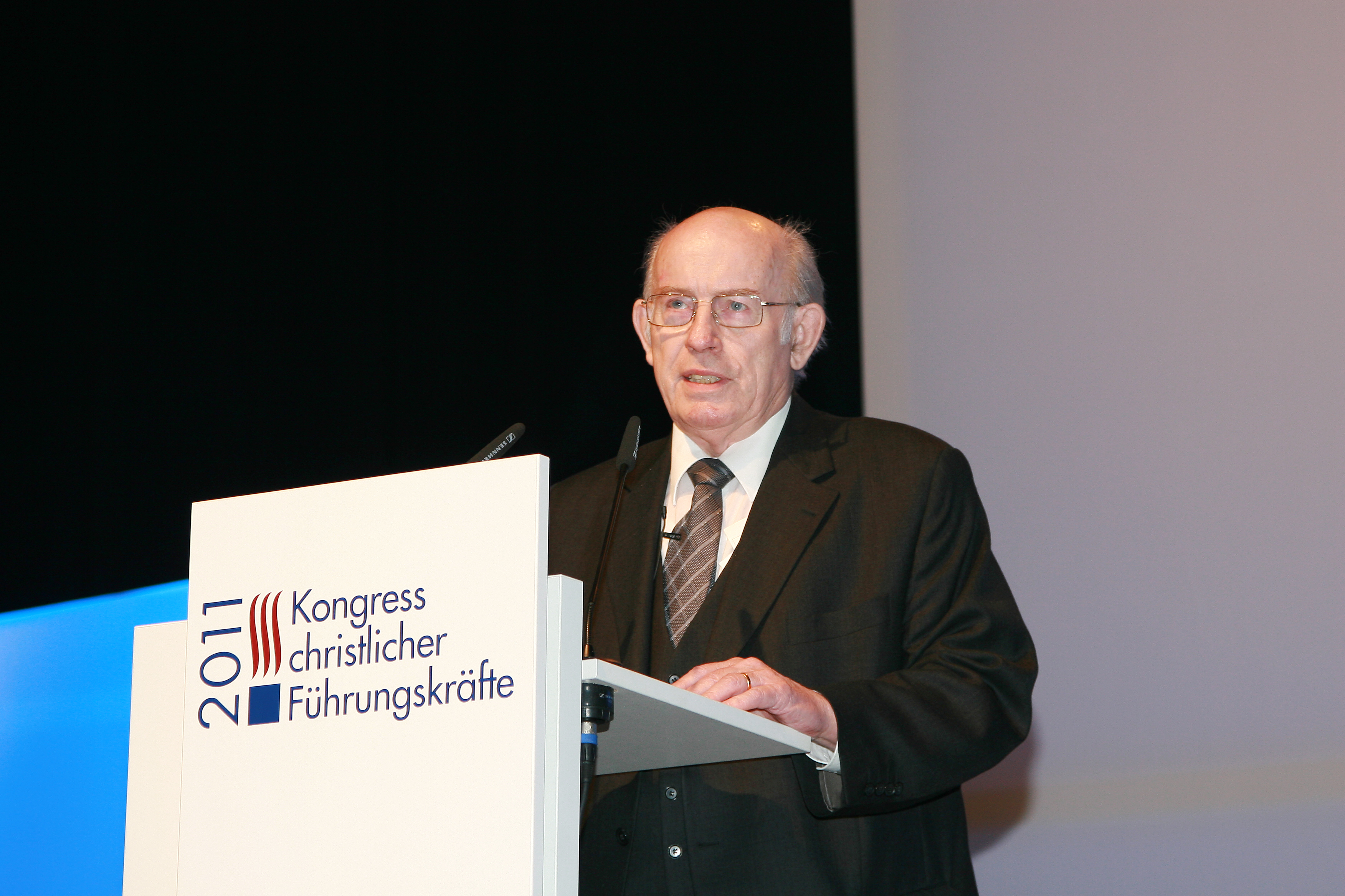 Horst Marquardt, Journalist und Autor, beim Christlichen Führungskräftekongress im Februar 2011 in Nürnberg